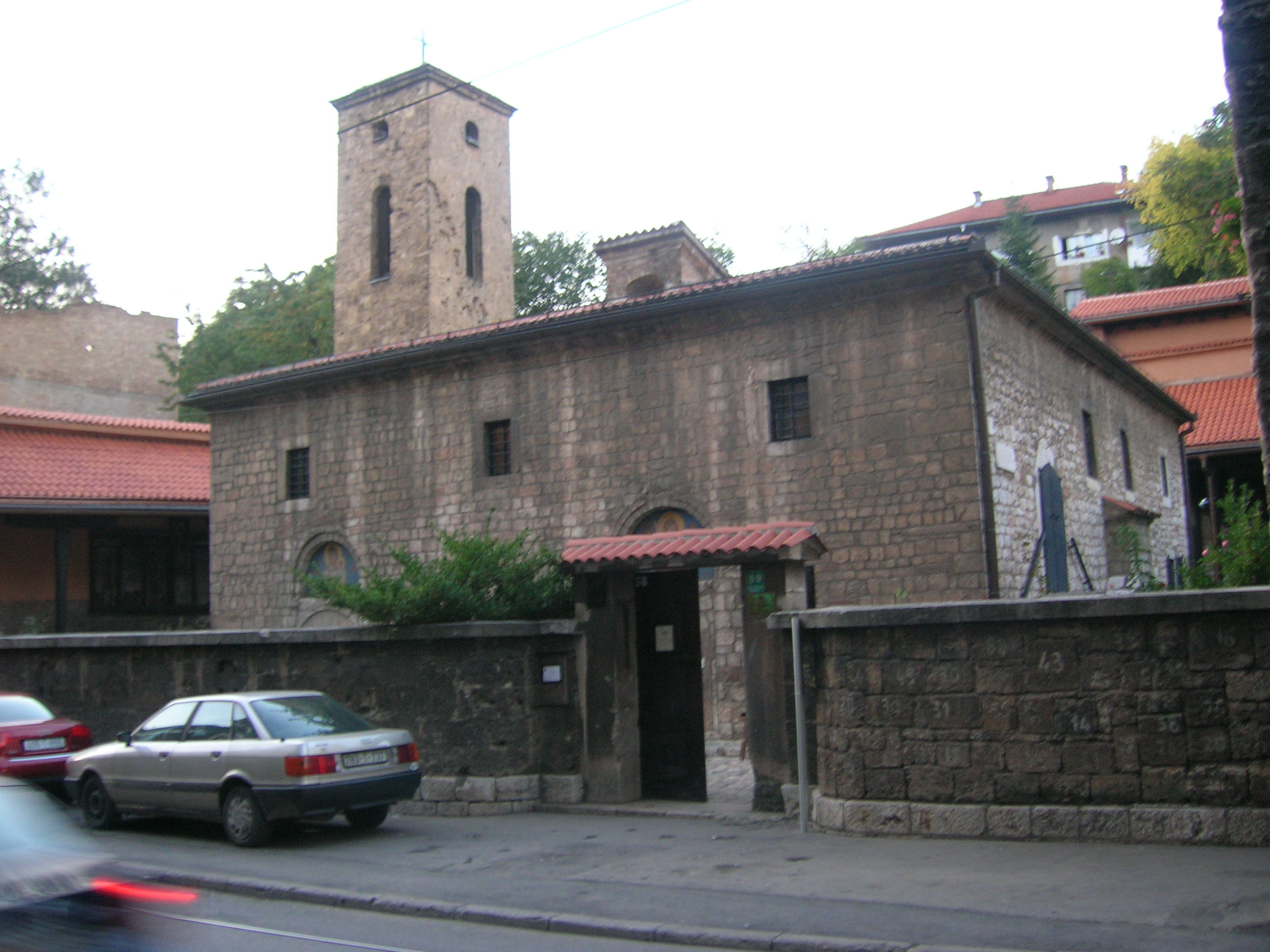 Босния и Герцеговина